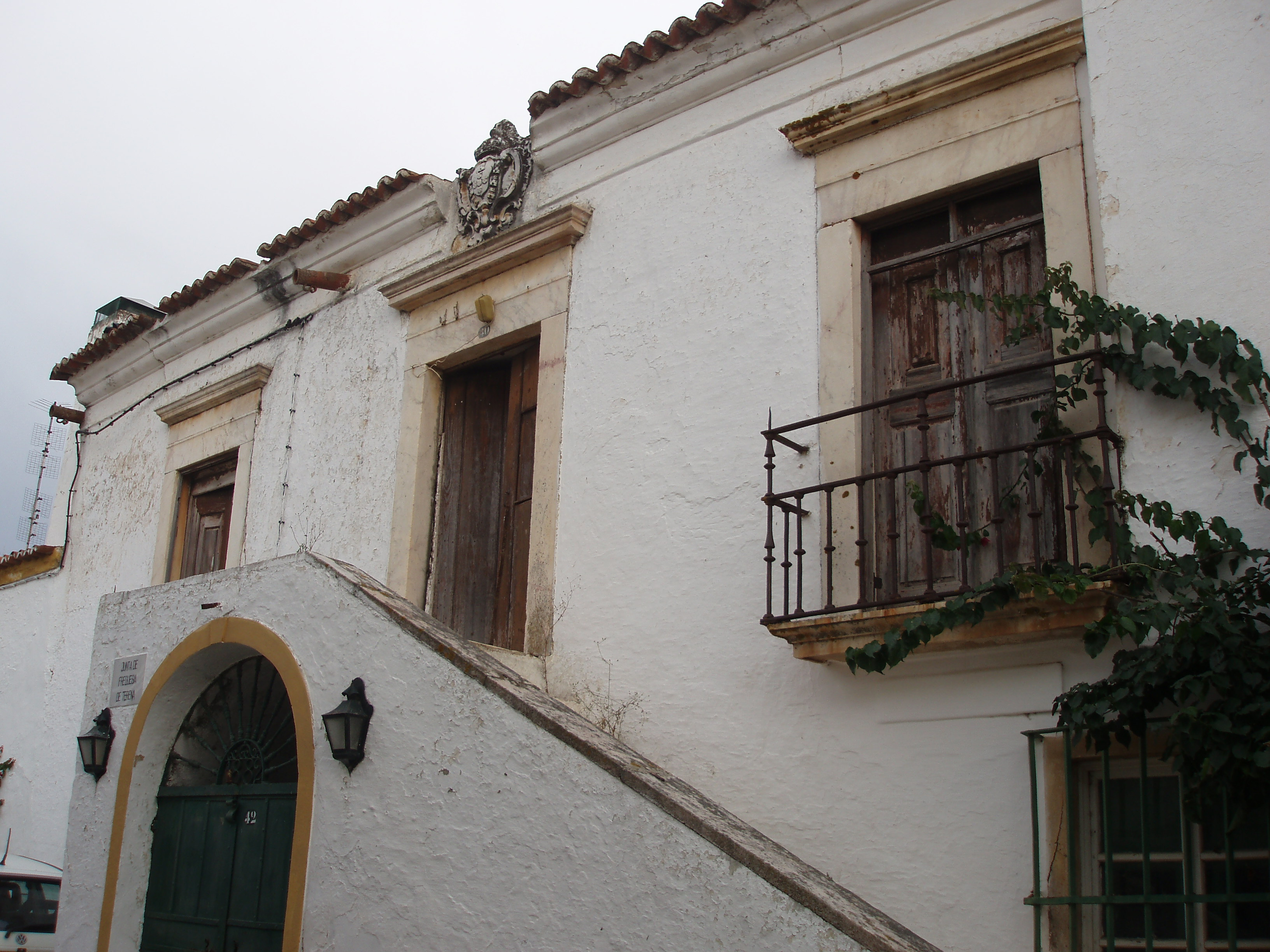 Antigos Paços do Concelho de Terena, Portugal